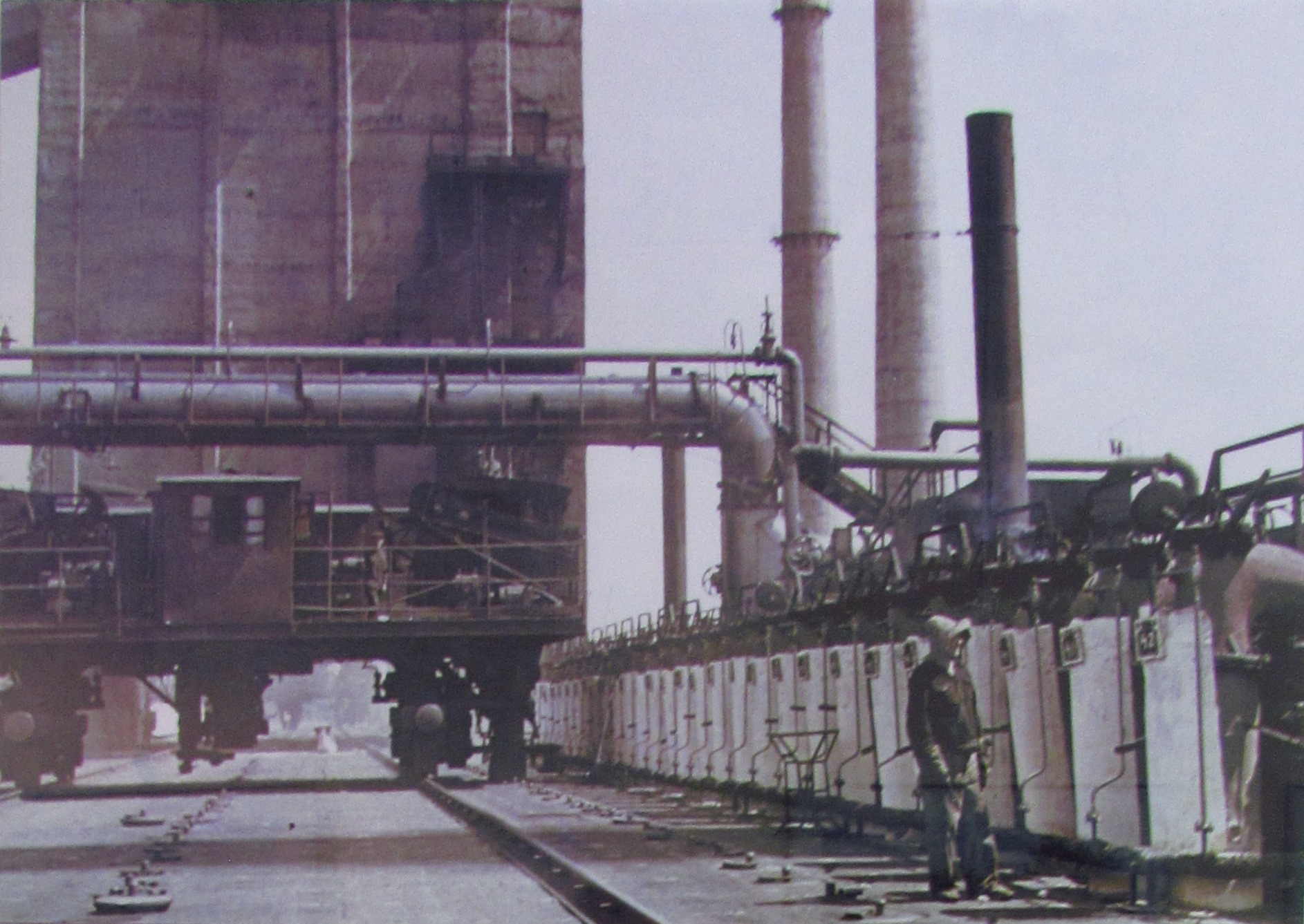 Exposition in Leninskiy District Historical and Cultural Center. Верх печей коксового цеха